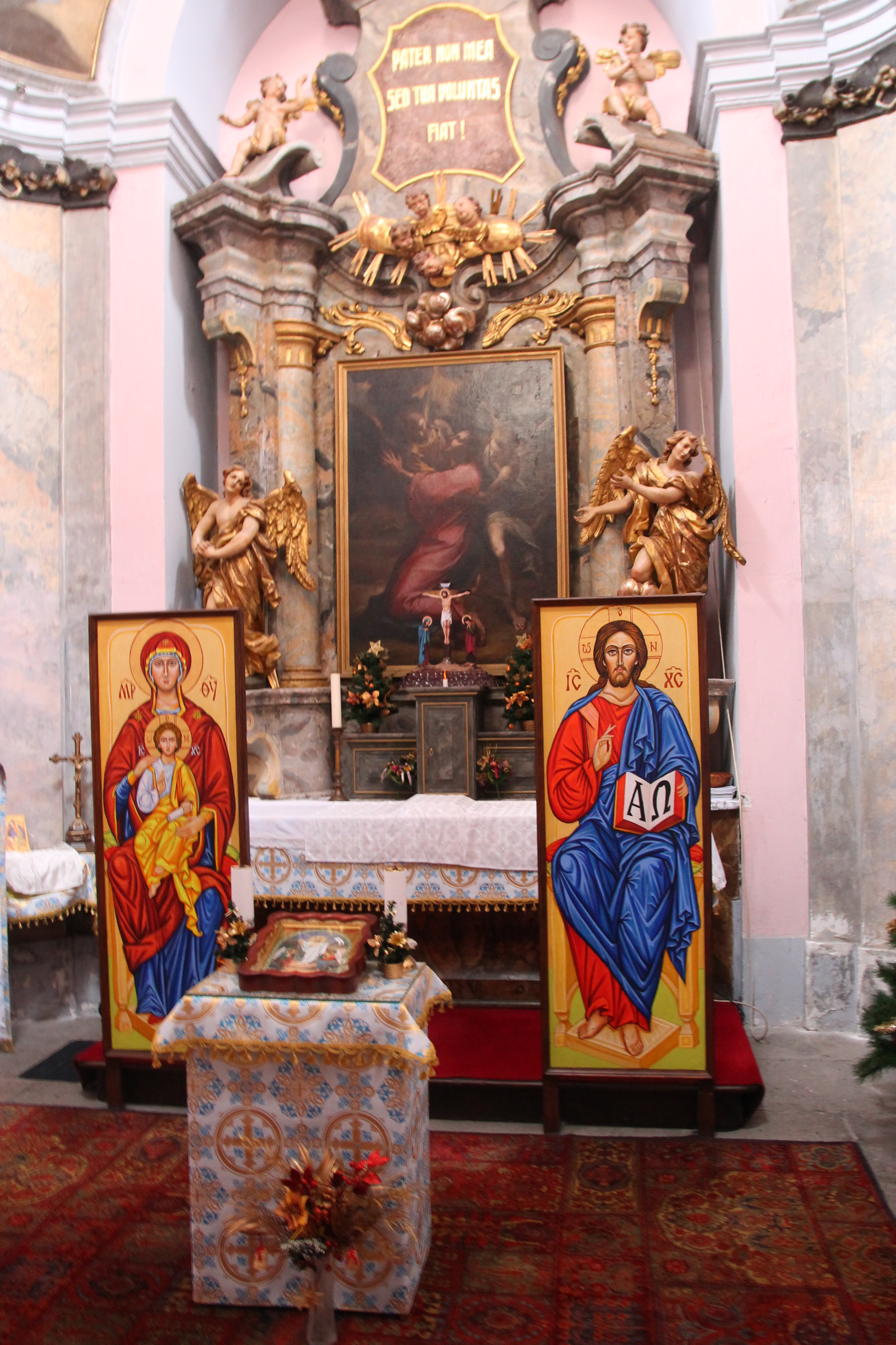 Kaple smrtelných úzkostí Páně, České Budějovice – interiér